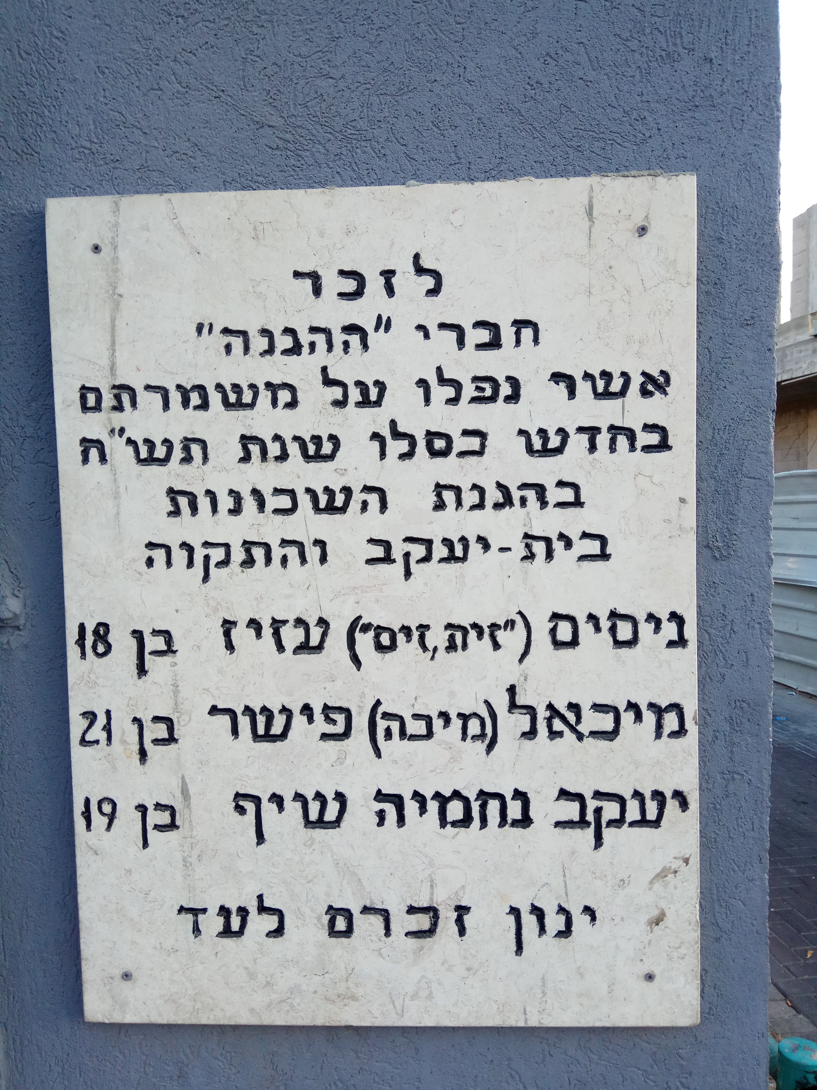 לוחית זיכרון בשכונת התקווה לשלושה אנשי ההגנה שנפלו בשכונת התקווה במלחמת העצמאות